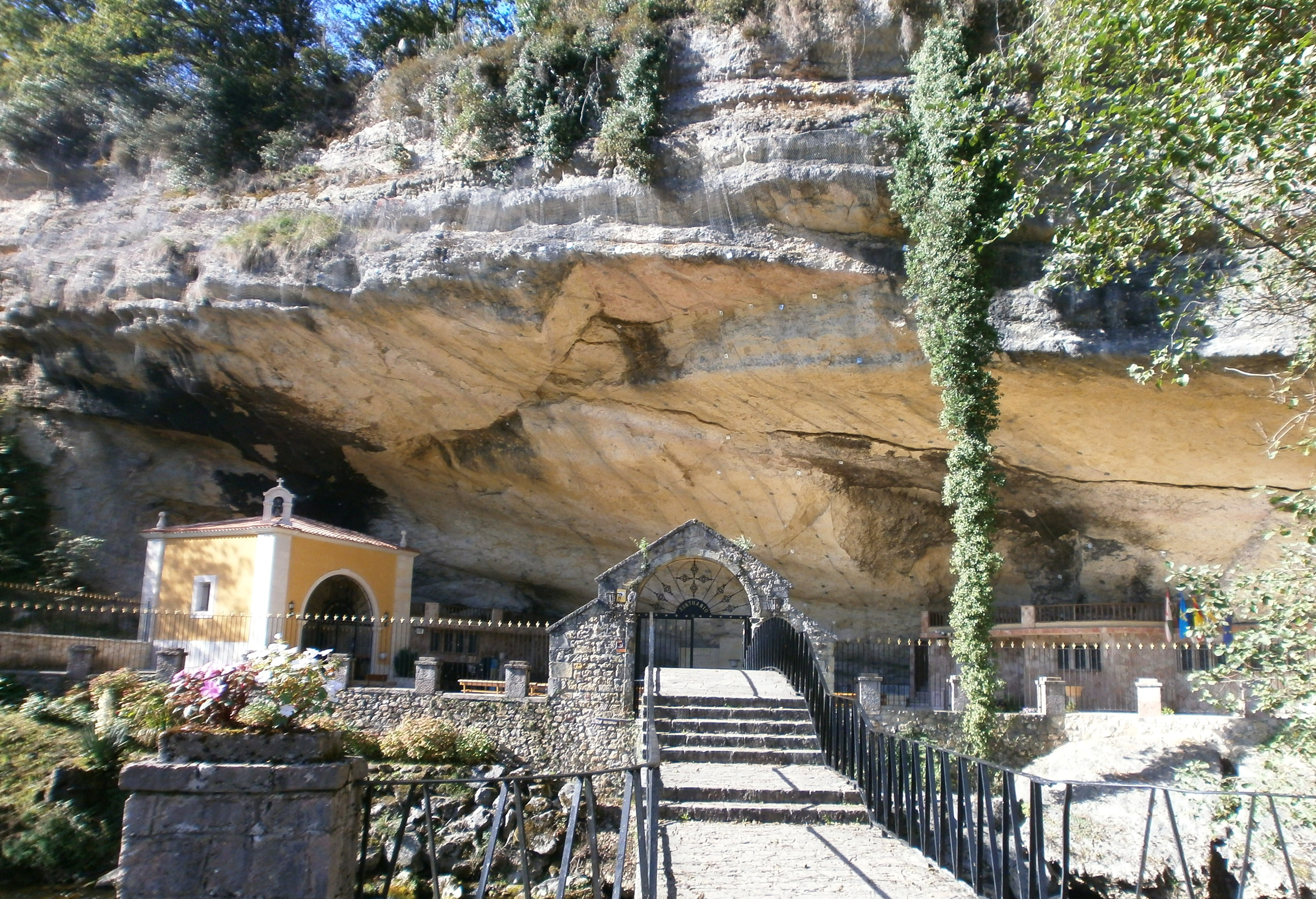 Vista general cercana del Santuario.